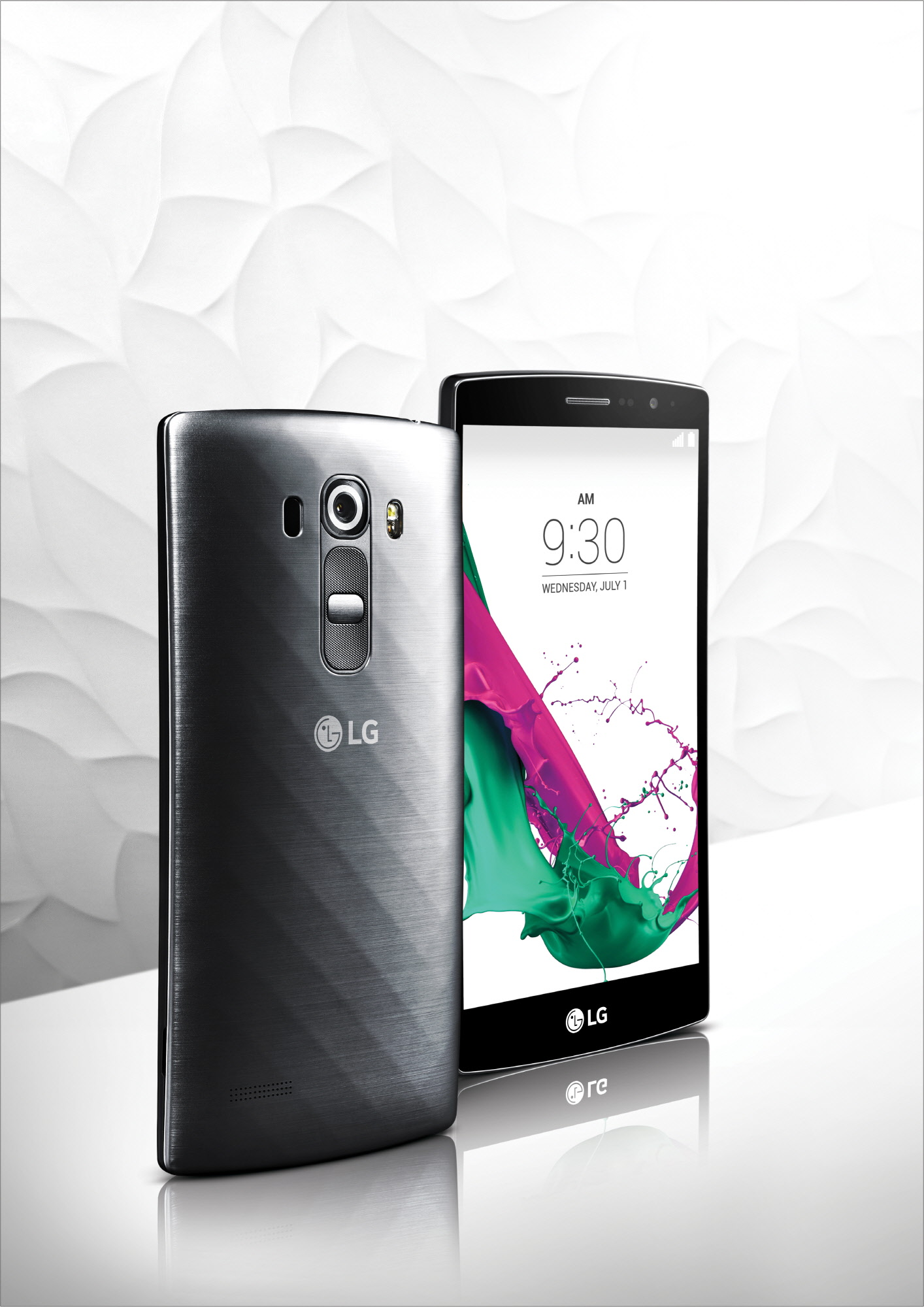 LG전자, ‘LG G4 비트(Beat)’ 글로벌 출시 ■ 브라질을 시작으로 중남미, 유럽, 아시아 등 순차 출시 ■ 옥타코어 칩셋, 풀HD 디스플레이 탑재로 동급 최강 화질과 성능 구현 ■ 1300만 화소 카메라, 컬러 스펙트럼 센서, 전문가 모드 탑재 ※ Social LG전자 ( 에서 관련 보도자료를 확인하실 수 있습니다.